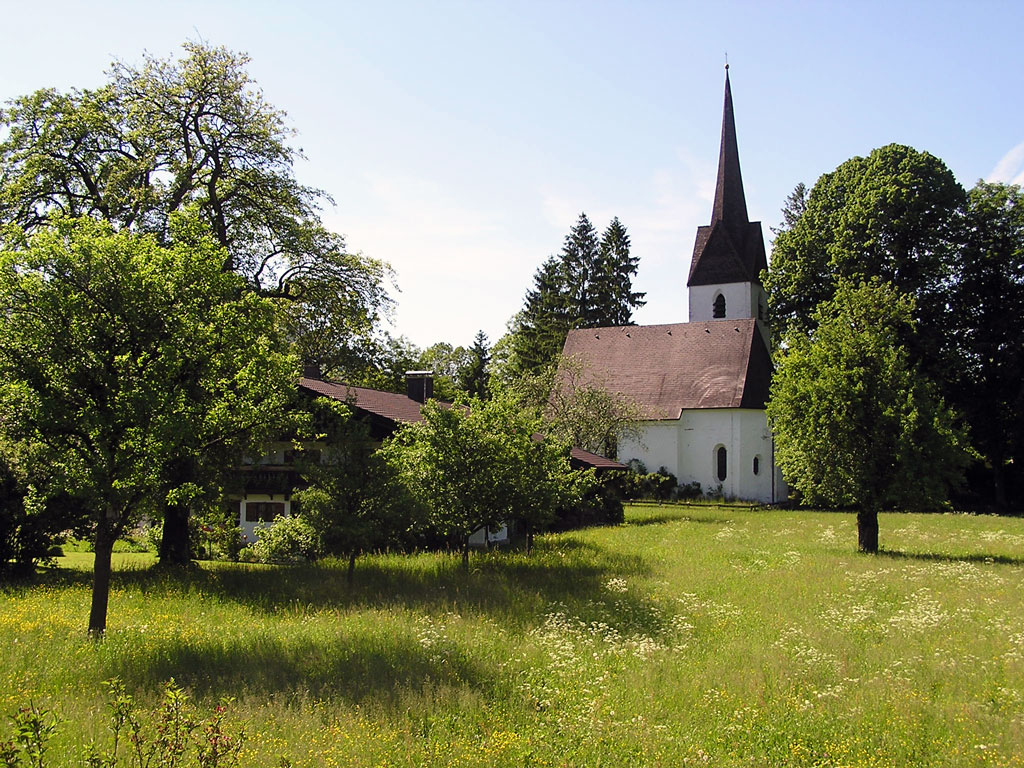 Die 1180 erstmals urkundlich erwähnte Ägidiuskirche im Brannenburger Ortsteil Degerndorf. Fotografiert von Benutzer:Mostpatiently am 2005-05-26